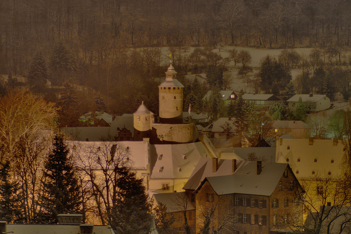 Das Schloss Büdingen bei Nacht im Schnee, Hessen, Deutschland.